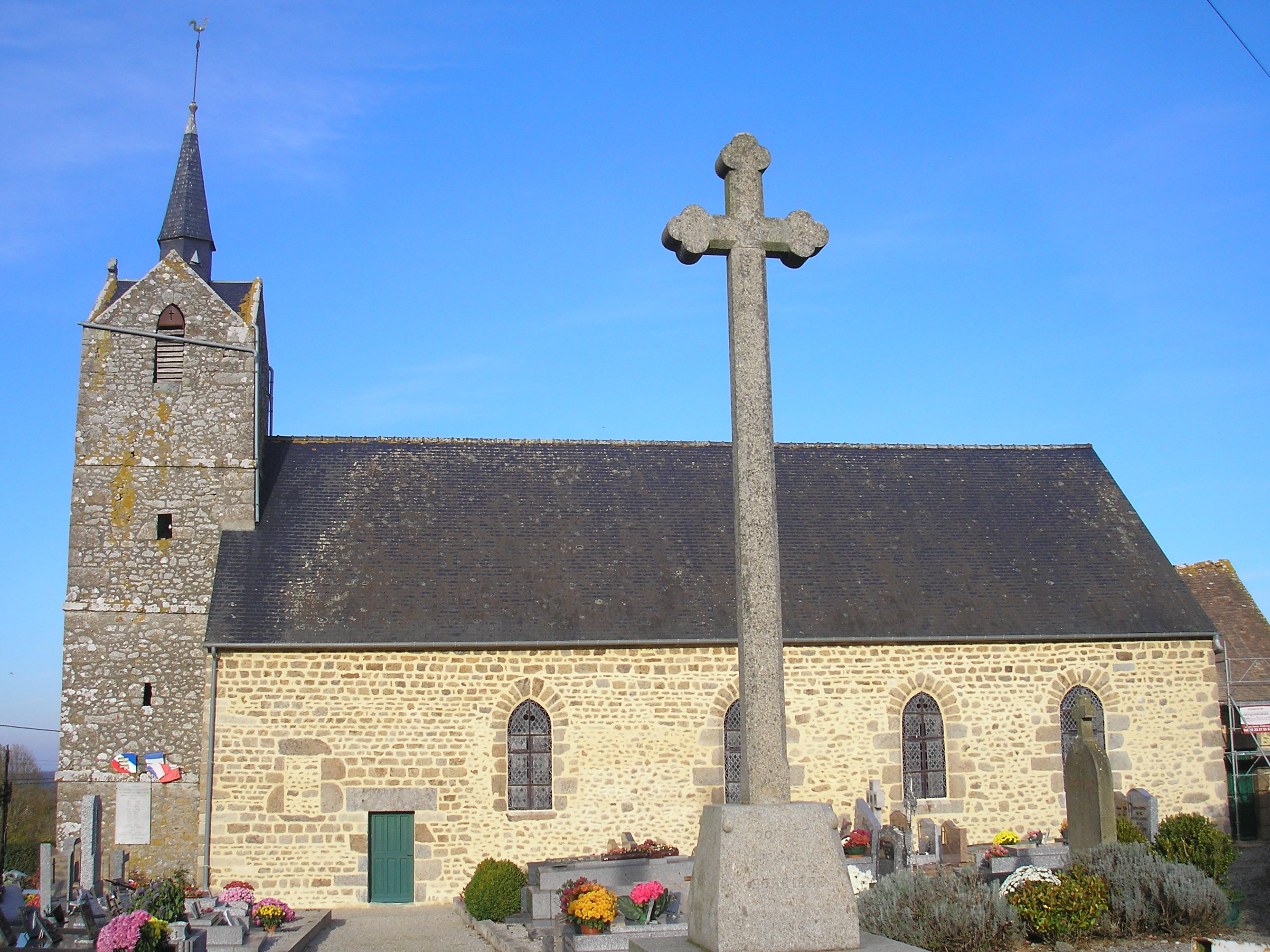 Le Ménil-Scelleur (Normandie, France). L'église Saint-Hilaire.